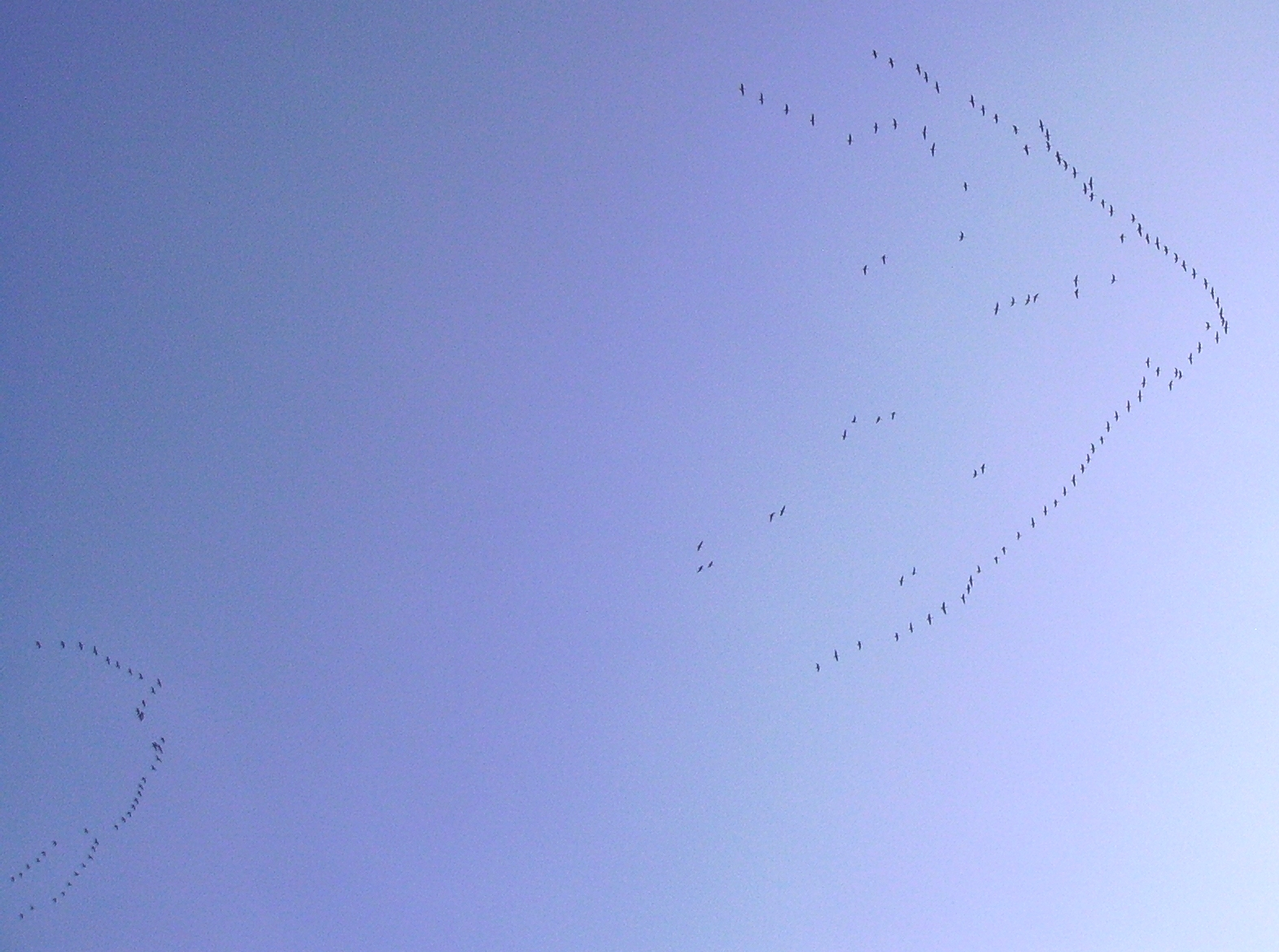 Zwei Schwärme Graugänse im Flug über Schleswig-Holstein auf dem Weg in ihr Winterquartier